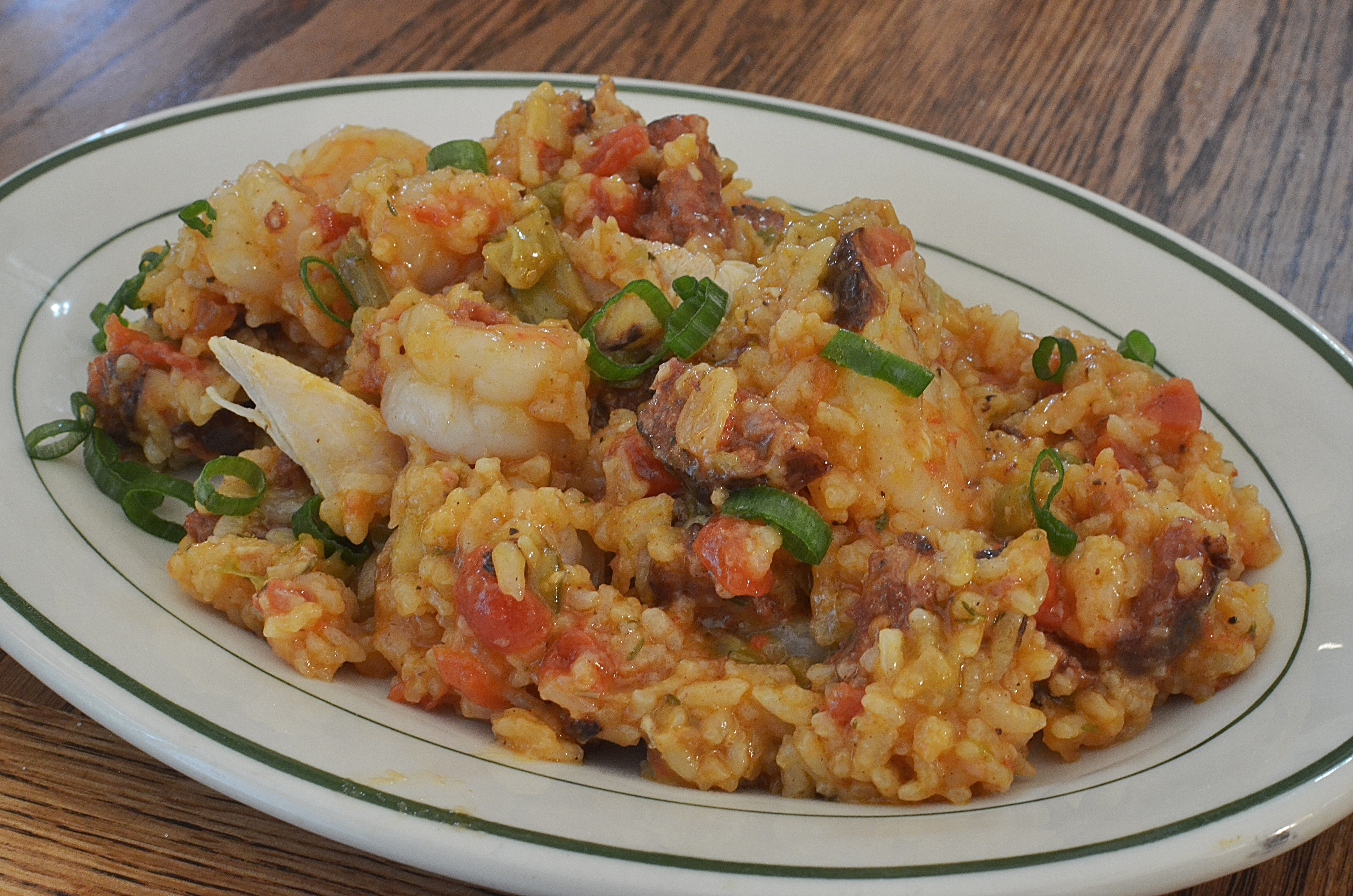 Mmm... jambalaya